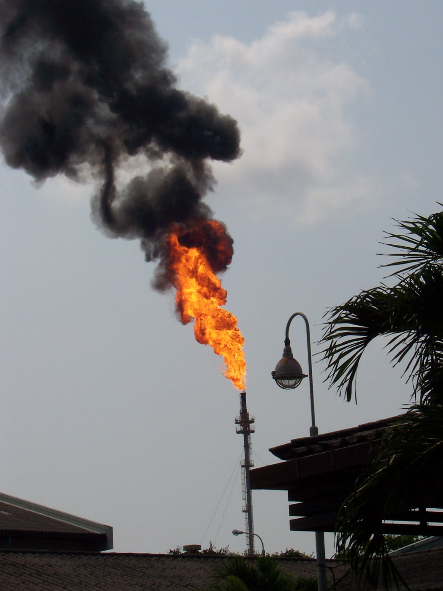 Flame at PTT (ปตท.) (Map Ta Phut, Rayong, Thailand)